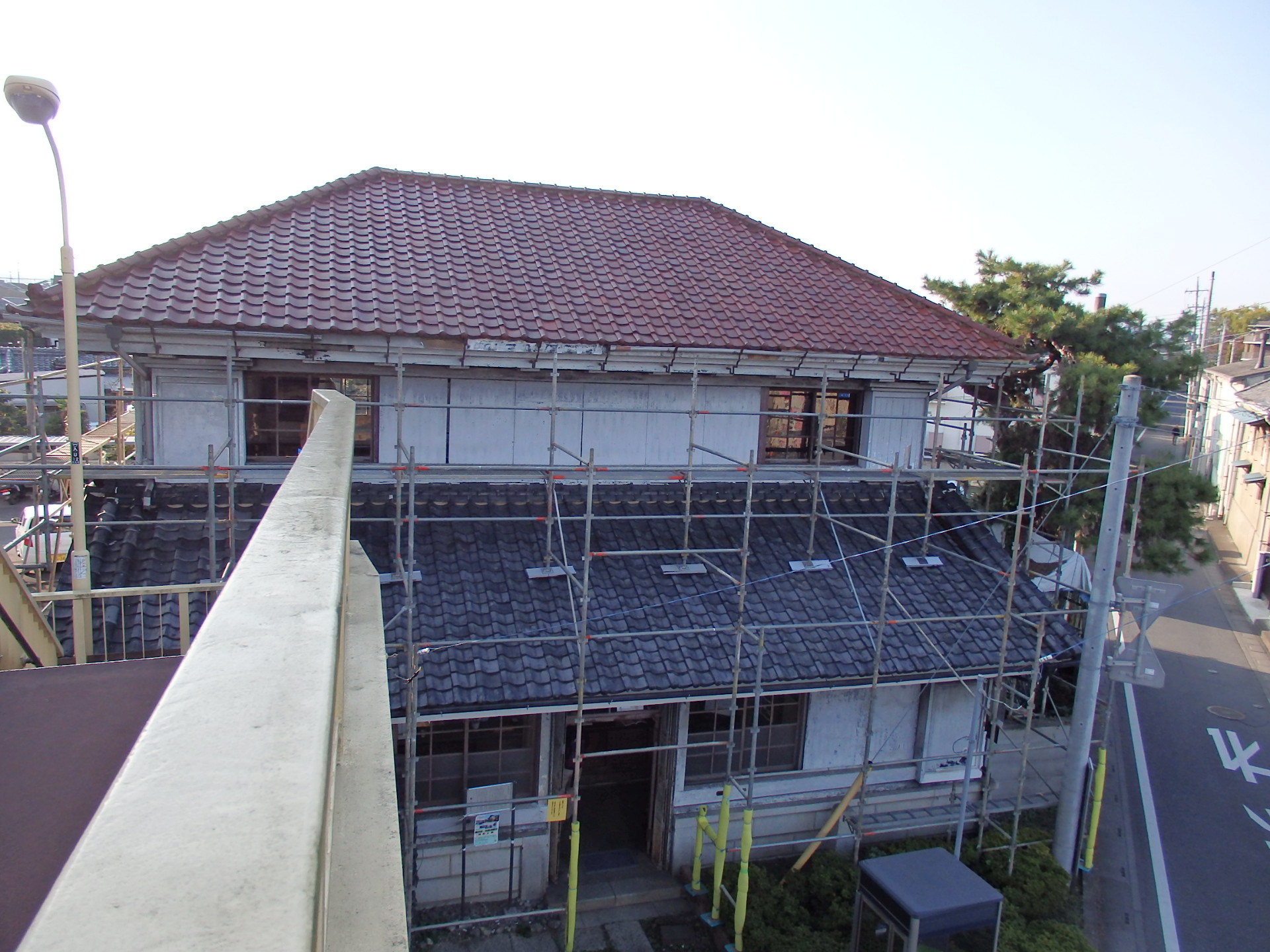 黒須銀行外観